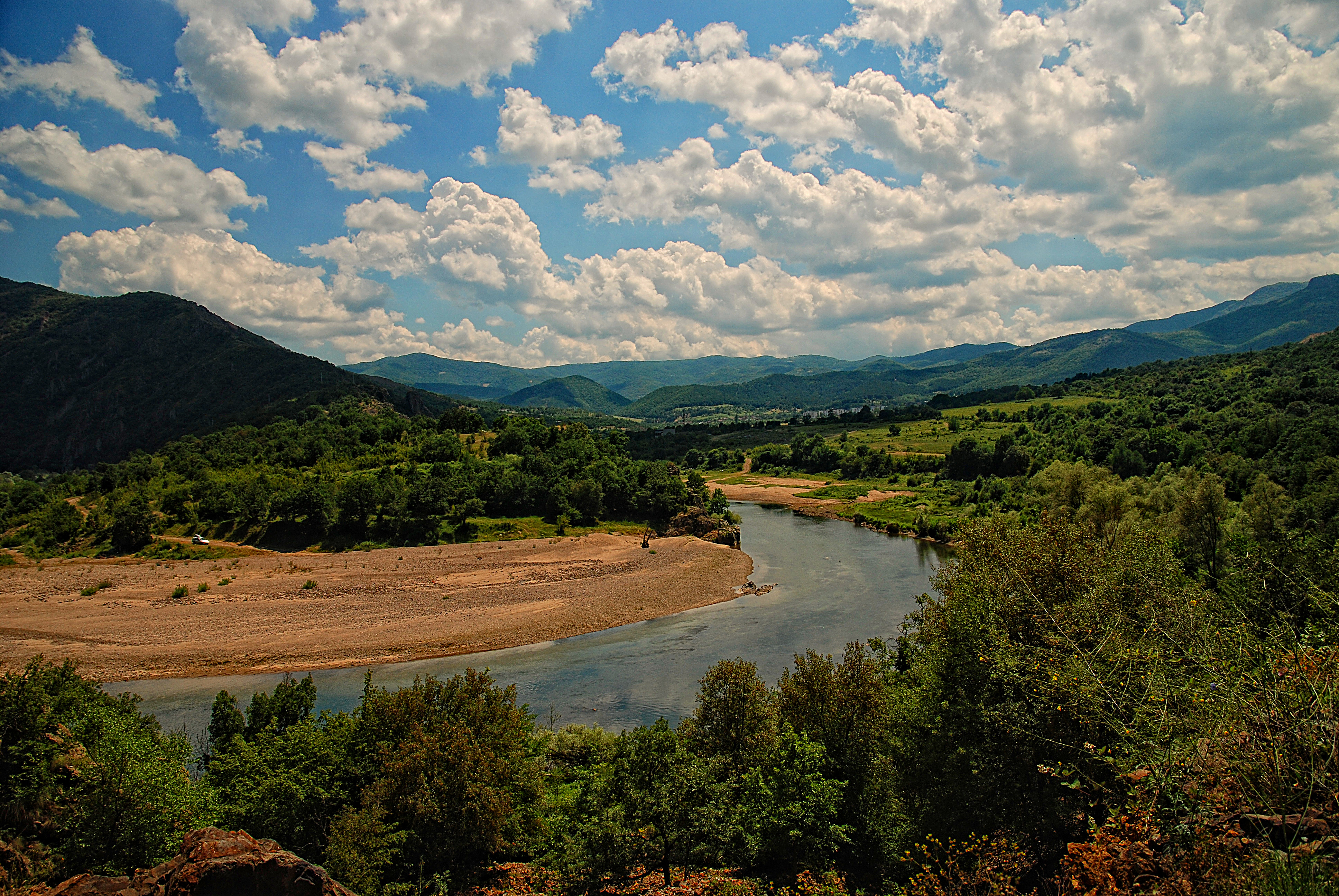 Вълчи дол